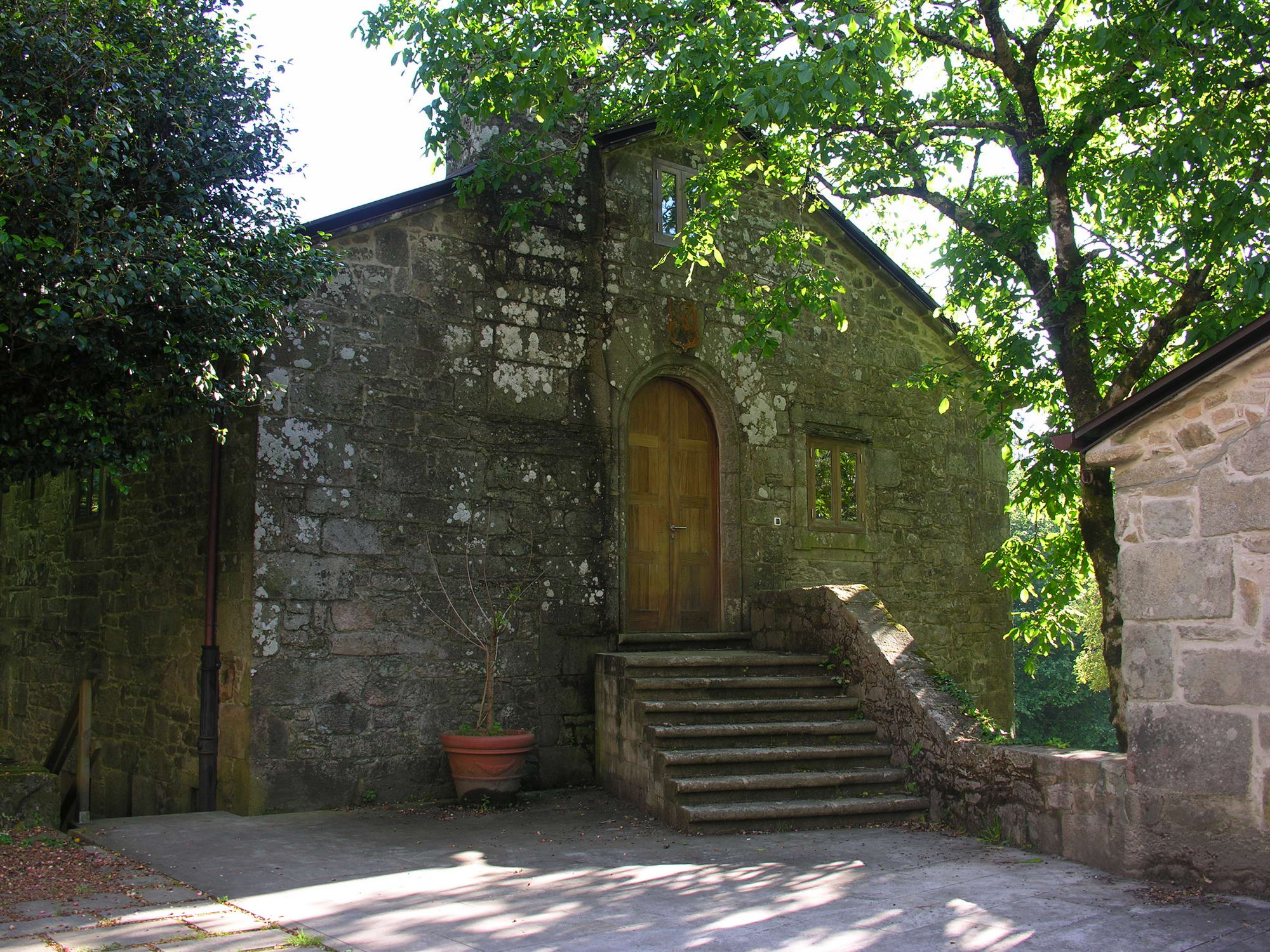 Casa rectoral da parroquia de San Xusto, hoxe convertida en Albergue. Concello de Lousame. Galicia